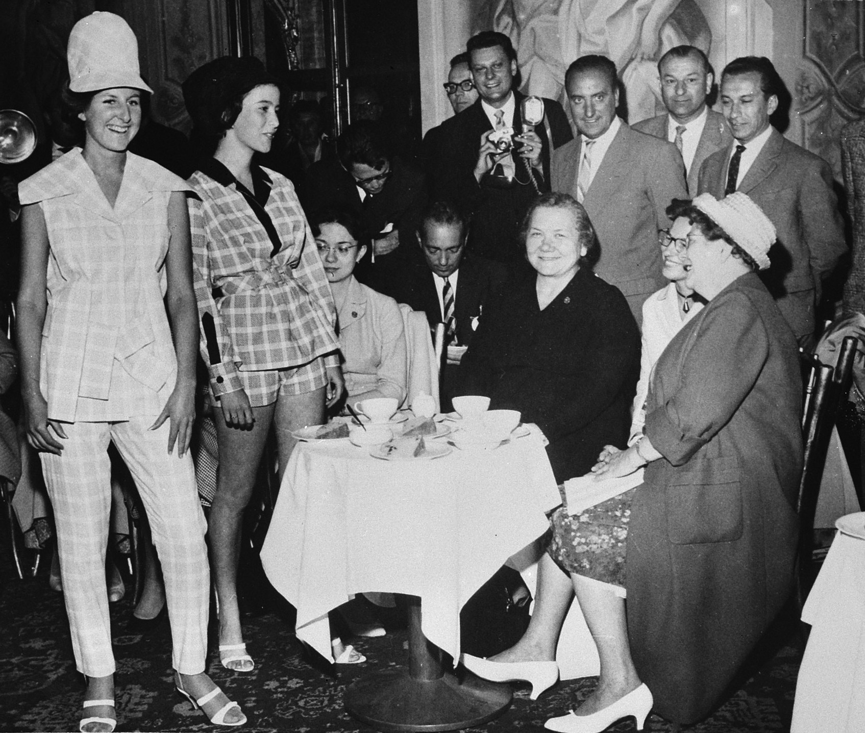 Mevrouw Chroetsjev bezoekt modeshow